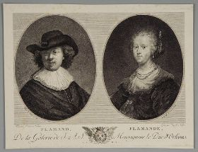 gravure